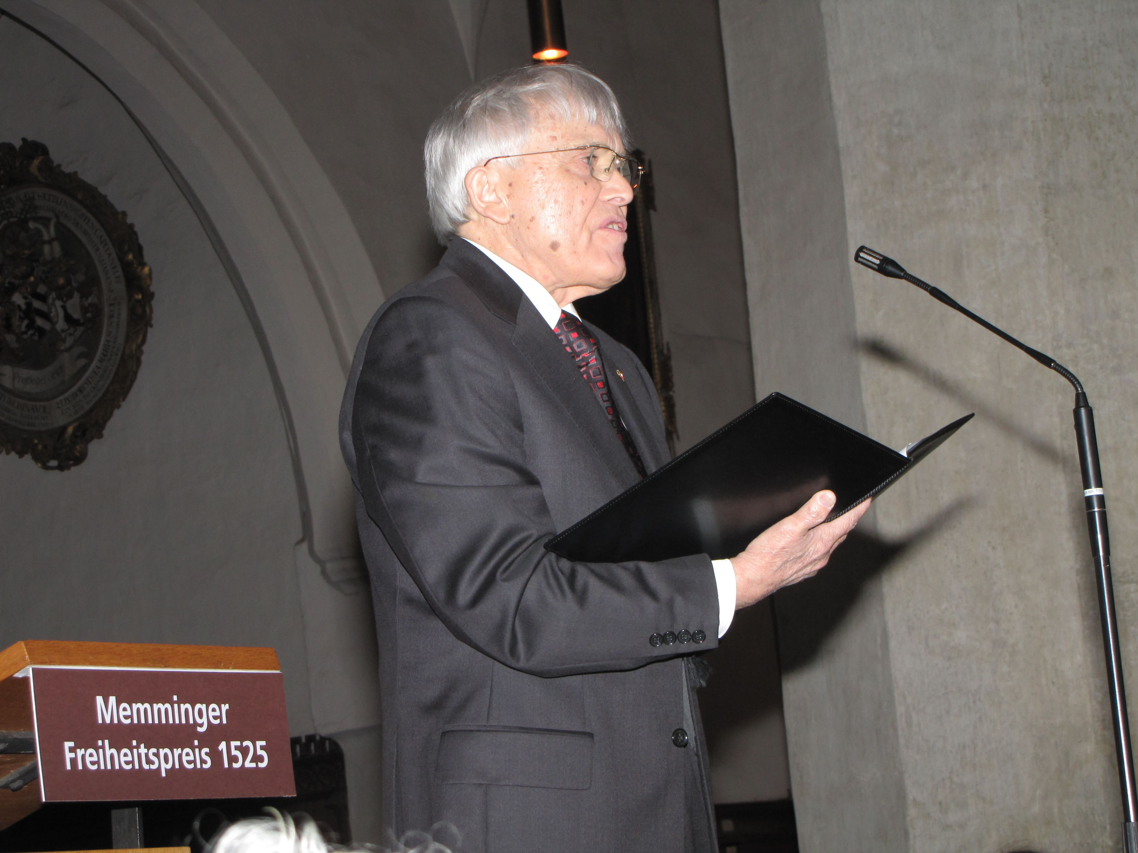 Reiner Kunze bei der Preisverleihung des zweiten Memminger Freiheitspreises 1525, den er kurz zuvor erhalten hatte.